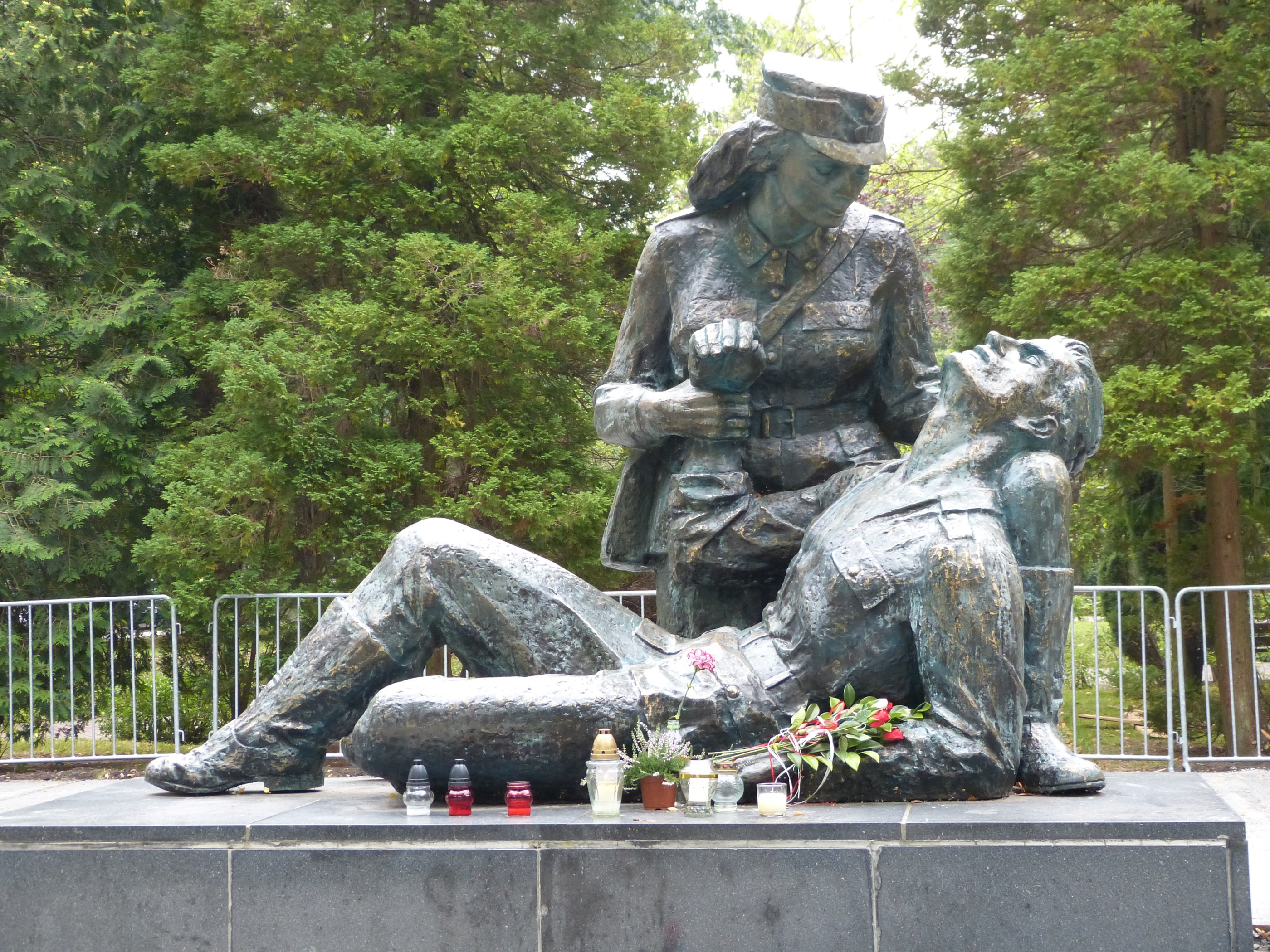 Pomnik jest wyrazem hołdu kobietom, które walczyły w szeregach Wojska Polskiego o wolność Ojczyzny w czasie II wojny światowej, szczególnie w zaciętych i krwawych walkach o Kołobrzeg. Przedstawia on klęczącą dziewczynę ubraną w żołnierski mundur, z przewieszoną przez ramię torbą, na której widnieje krzyż – sanitariuszka udziela pomocy rannemu żołnierzowi. Wzorem dziewczyny na pomniku była sanitariuszka szer. Ewelina Nowak, która poległa podczas walk o Kołobrzeg w marcu 1945 roku, zastrzelona przez niemieckiego snajpera, gdy ściągała z pola walki rannego żołnierza. Pomnik jest tak zaprojektowany, że do twarzy dziewczyny nie docierają promienie słońca – wyrażając smutek. Pomnik ten, projektu Adolfa Cogiela jest niewątpliwie jednym z najpiękniejszych w Europie monumentów poświęconych II wojnie światowej.